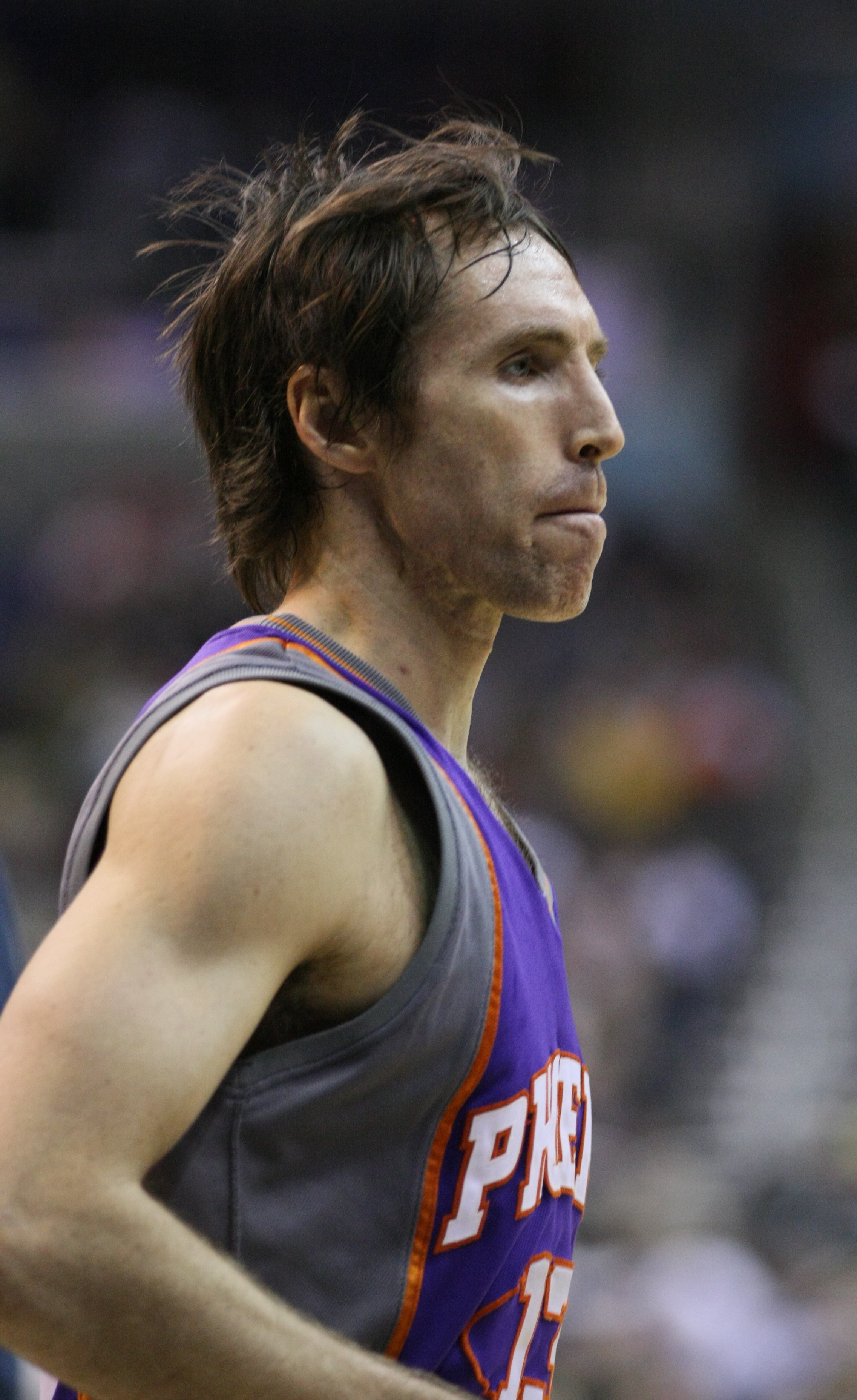 El jugador canadiense de baloncesto Steve Nash.